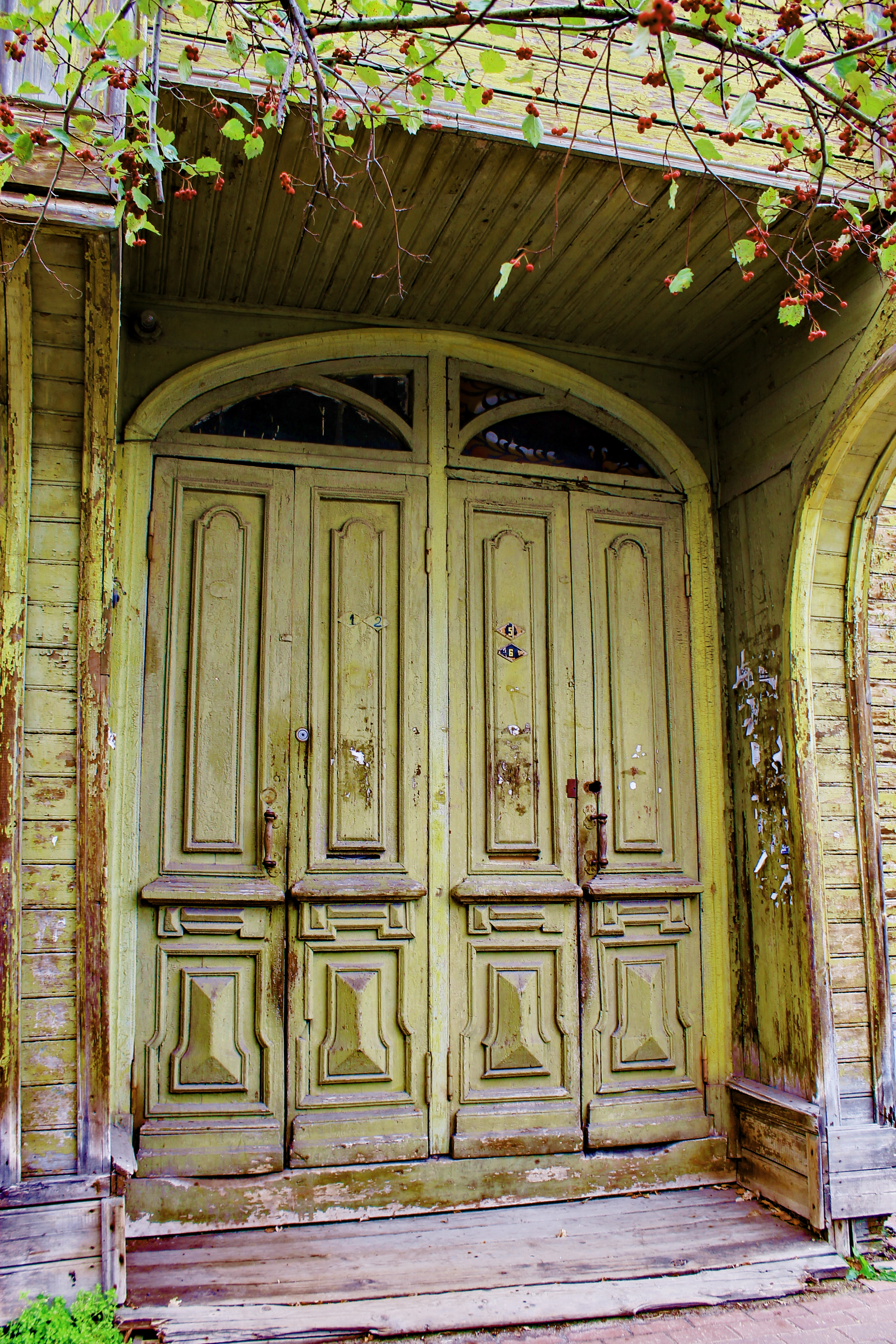 Главный дом усадьбы А.Н. Седова: улица Студёная, 49 / улица Славянская, 6, Нижний Новгород, Нижегородская область